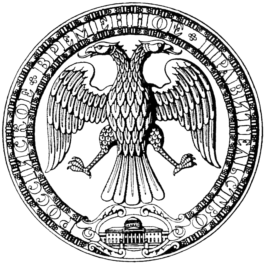 Оттиск печати Российского временного правительства